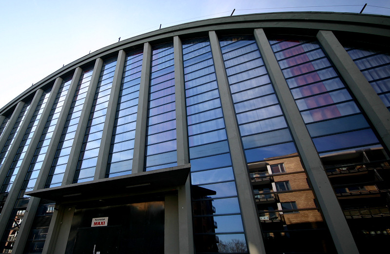 Bjølsenhallen i Oslo